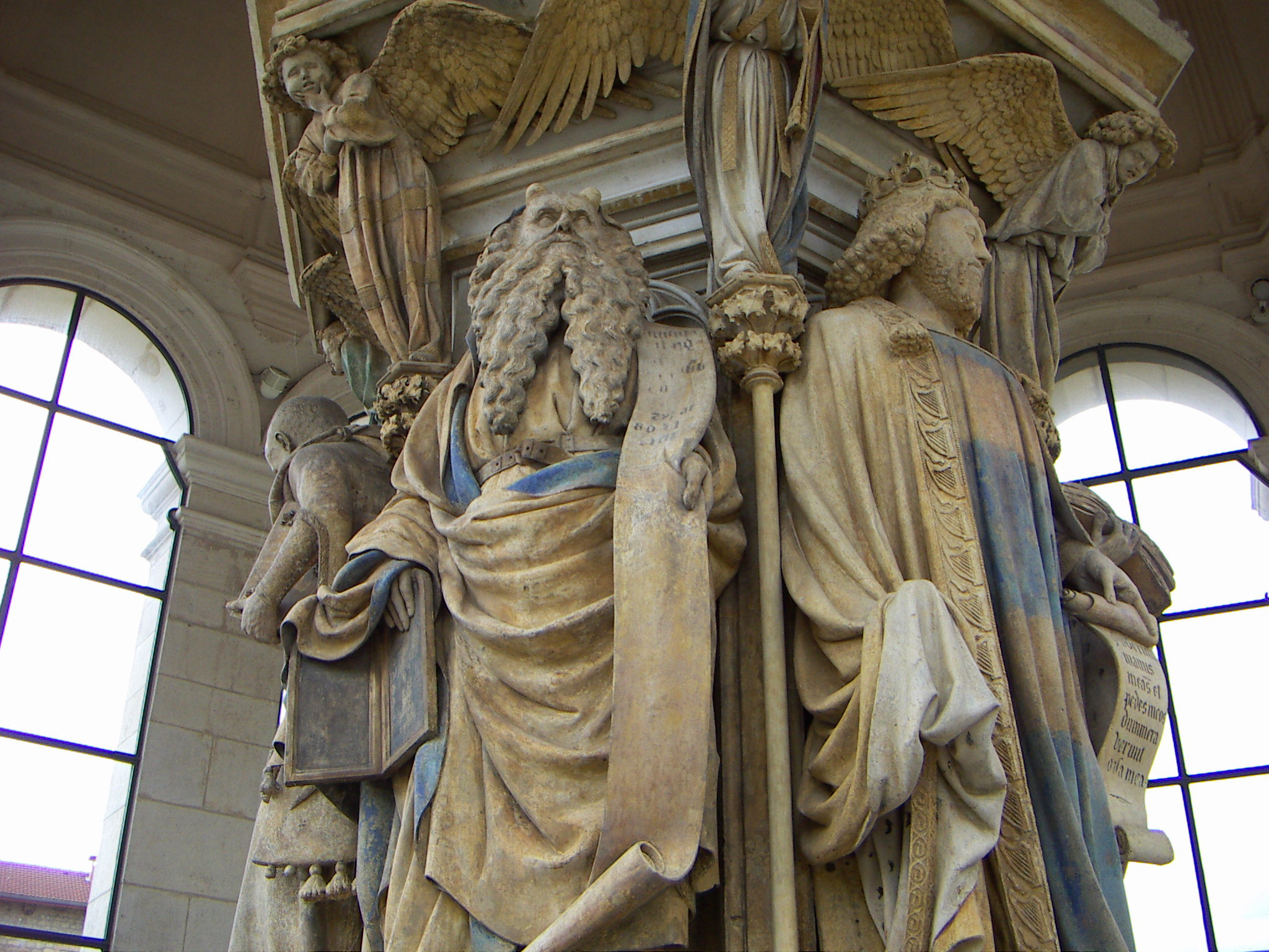 Claus Sluter, Puits de Moise, Dijon